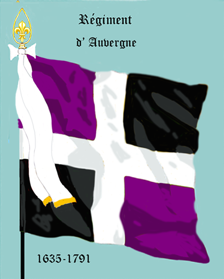 Ordonnanzfahne eines königlich französischen Infanterie-Regiments. - Entnommen und überarbeitet aus: „LES UNIFORMES ET LES DRAPEAUX DE L'ARMÉE DU ROI“ Marseille 1899. (Drapeau d'Ordonnance d' un régiment française d'infanterie royale.)